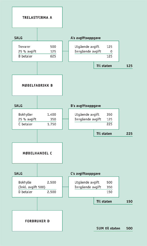 Skjemaet viser hvordan merverdiavgiften som blir betalt inn av forbruker i siste ledd, blir innkrevet og betalt til staten i porsjoner, i samtlige produksjons-/ handelsledd.